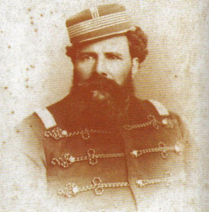 Retrato fotográfico de Justino Muniz, militar uruguayo.